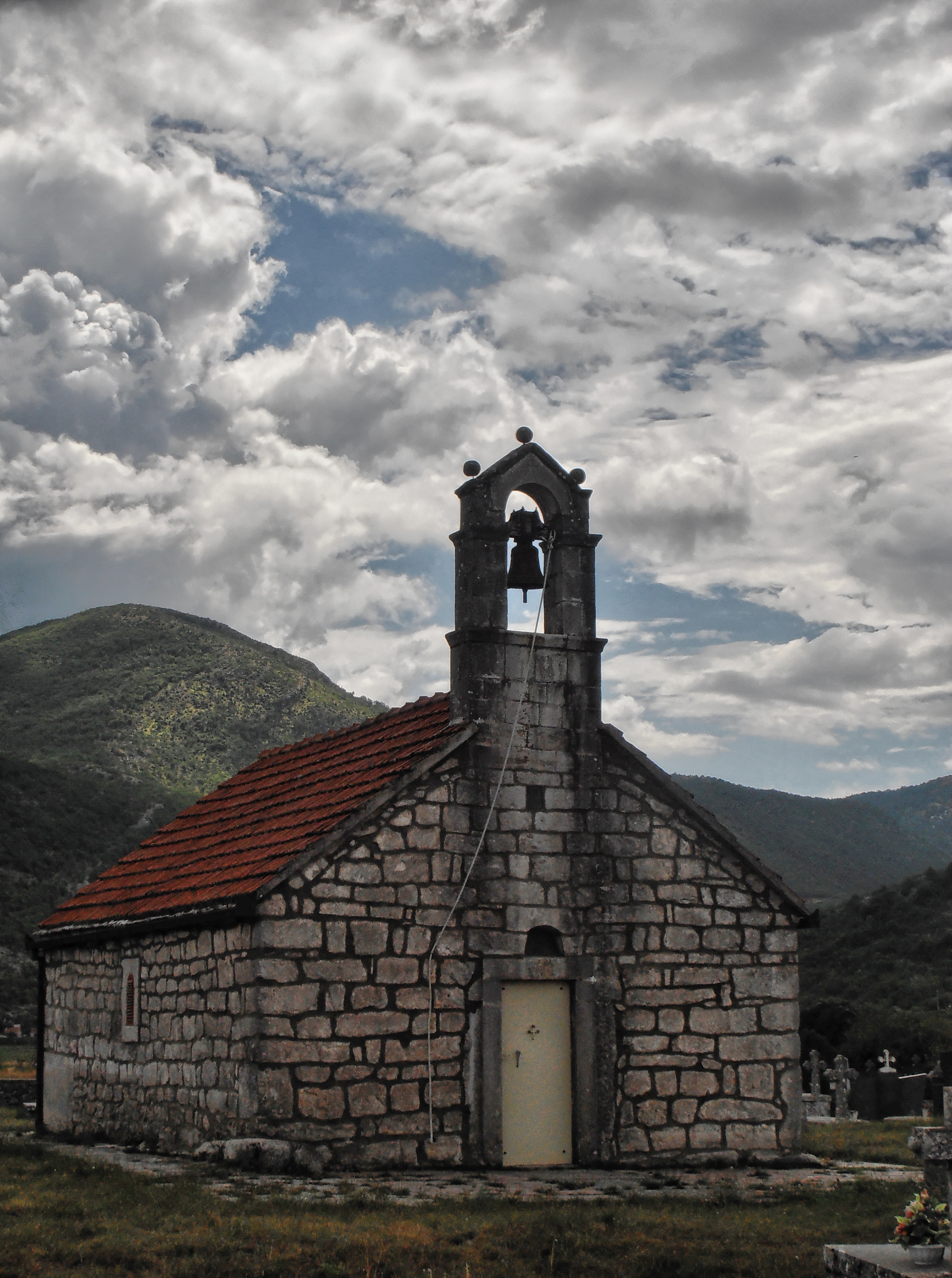 NKD683 Црква свете Петке између Зубаца и Граба, села у близини Требиња